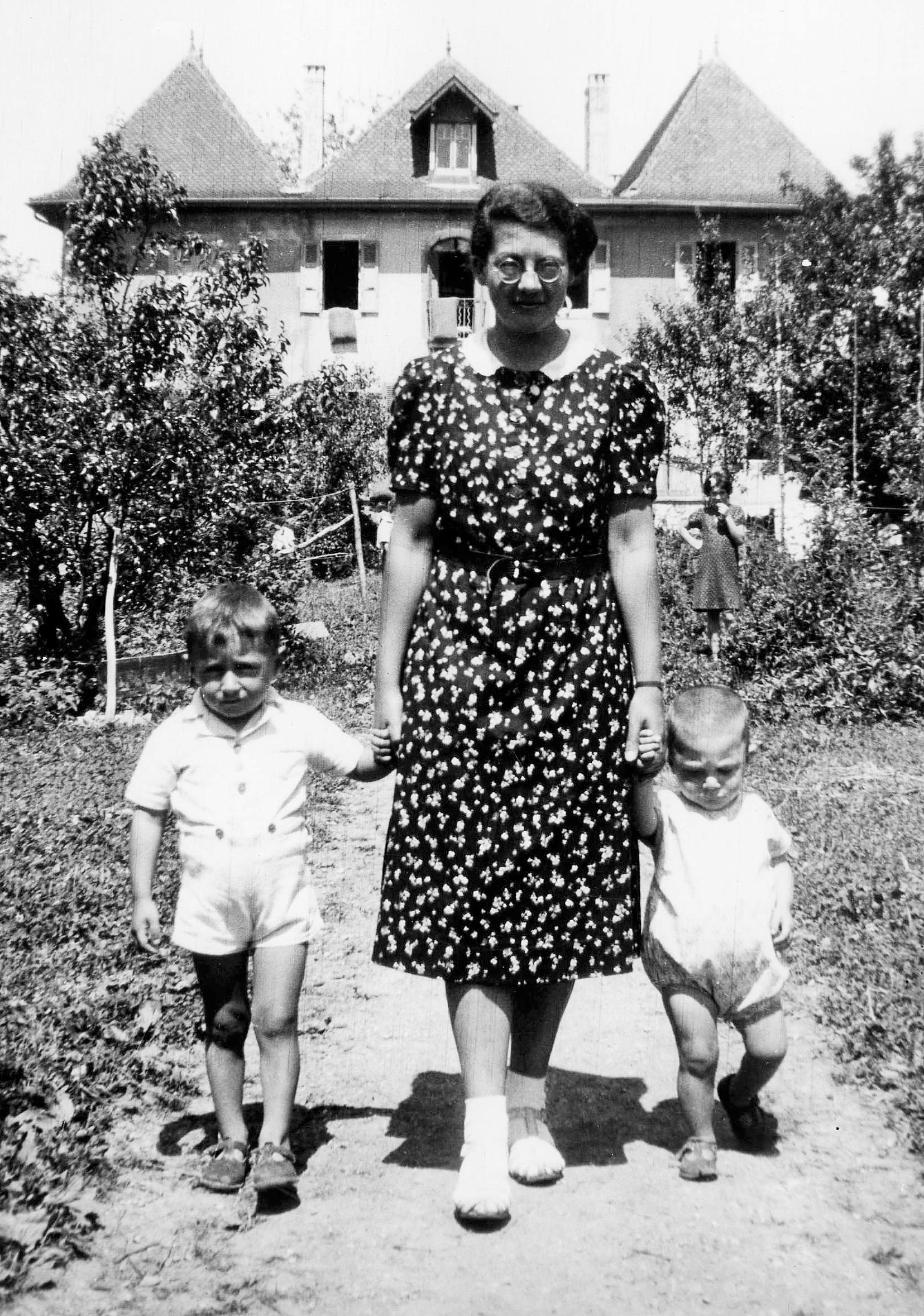 SRK Kinderheim Pringy, Frankreich